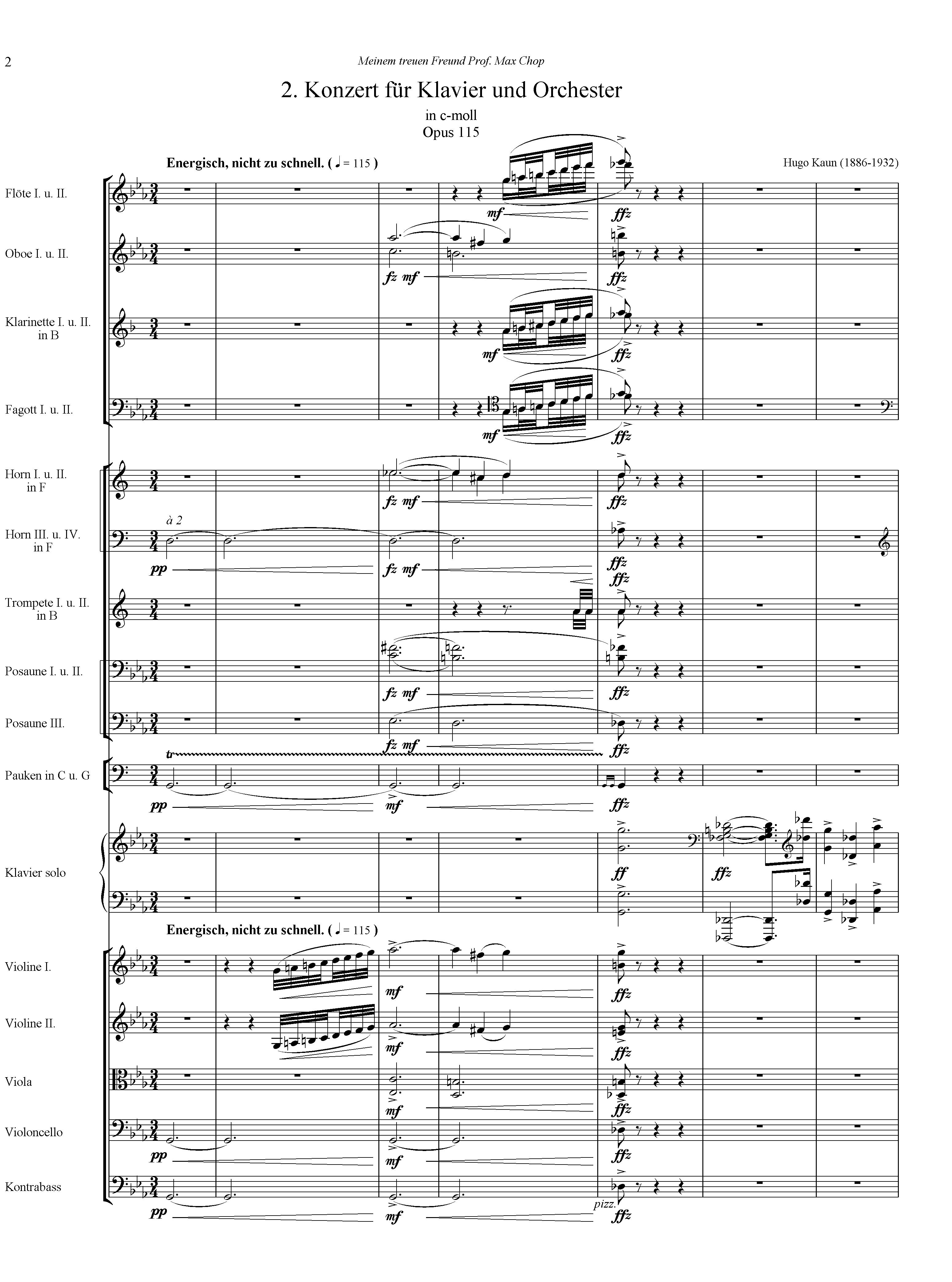 wie zuvor: nun Format **.jpg (bessere Vorschau)